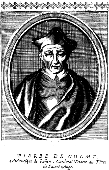 Pierre de Colmieu († 25 mai 1253), archevêque de Rouen puis cardinal d'Albane.